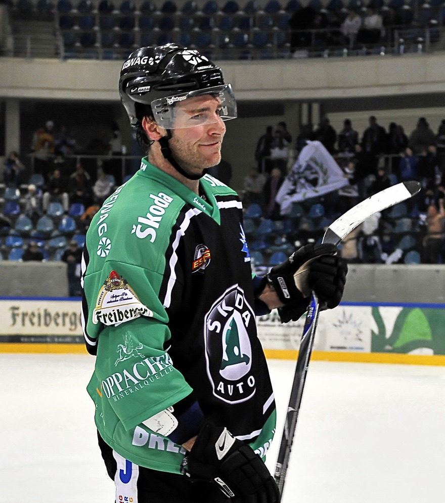 Jason Miller, Dresdner Eislöwen 2008/09